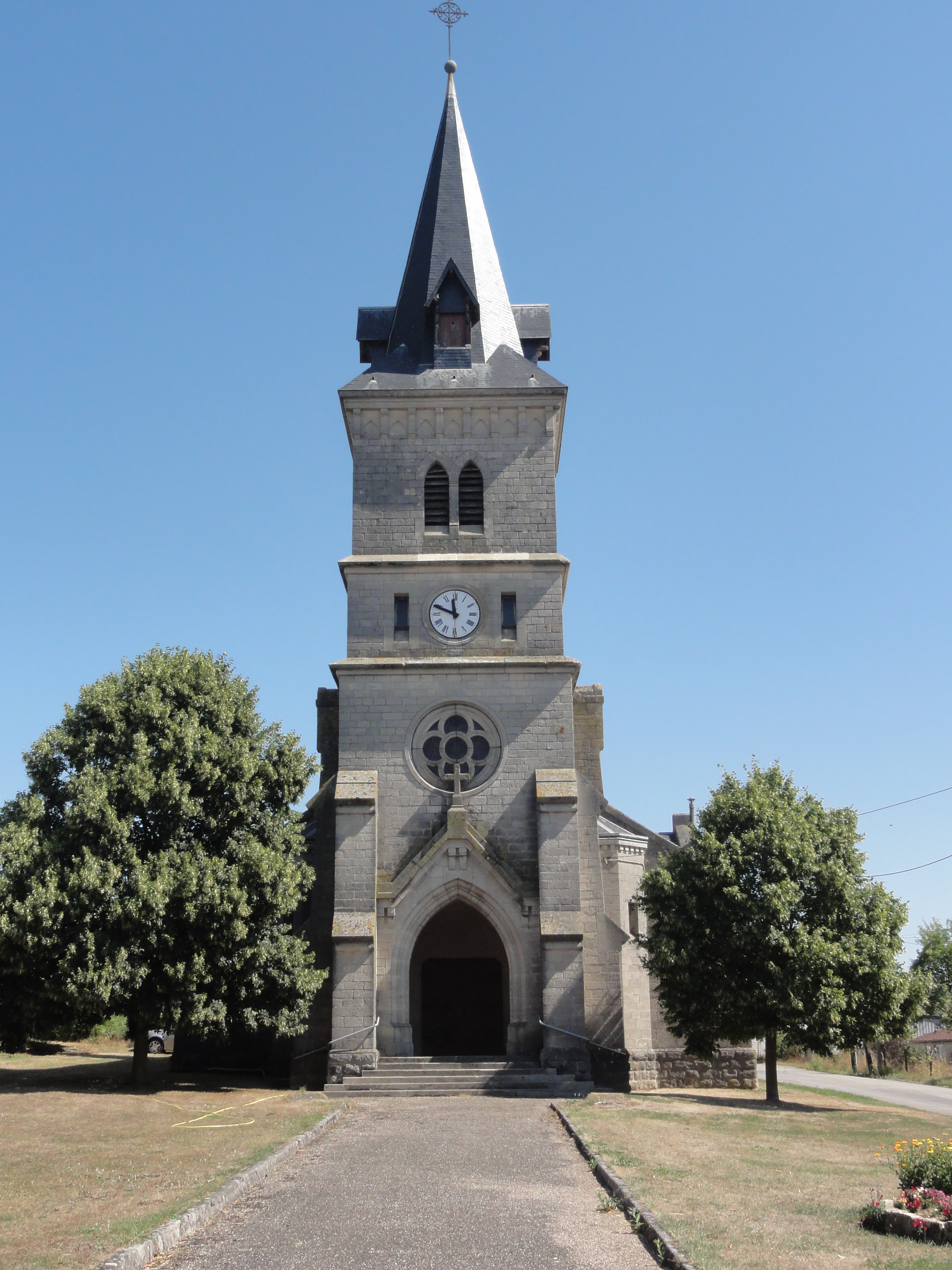 Forges-sur-Meuse (Meuse) église